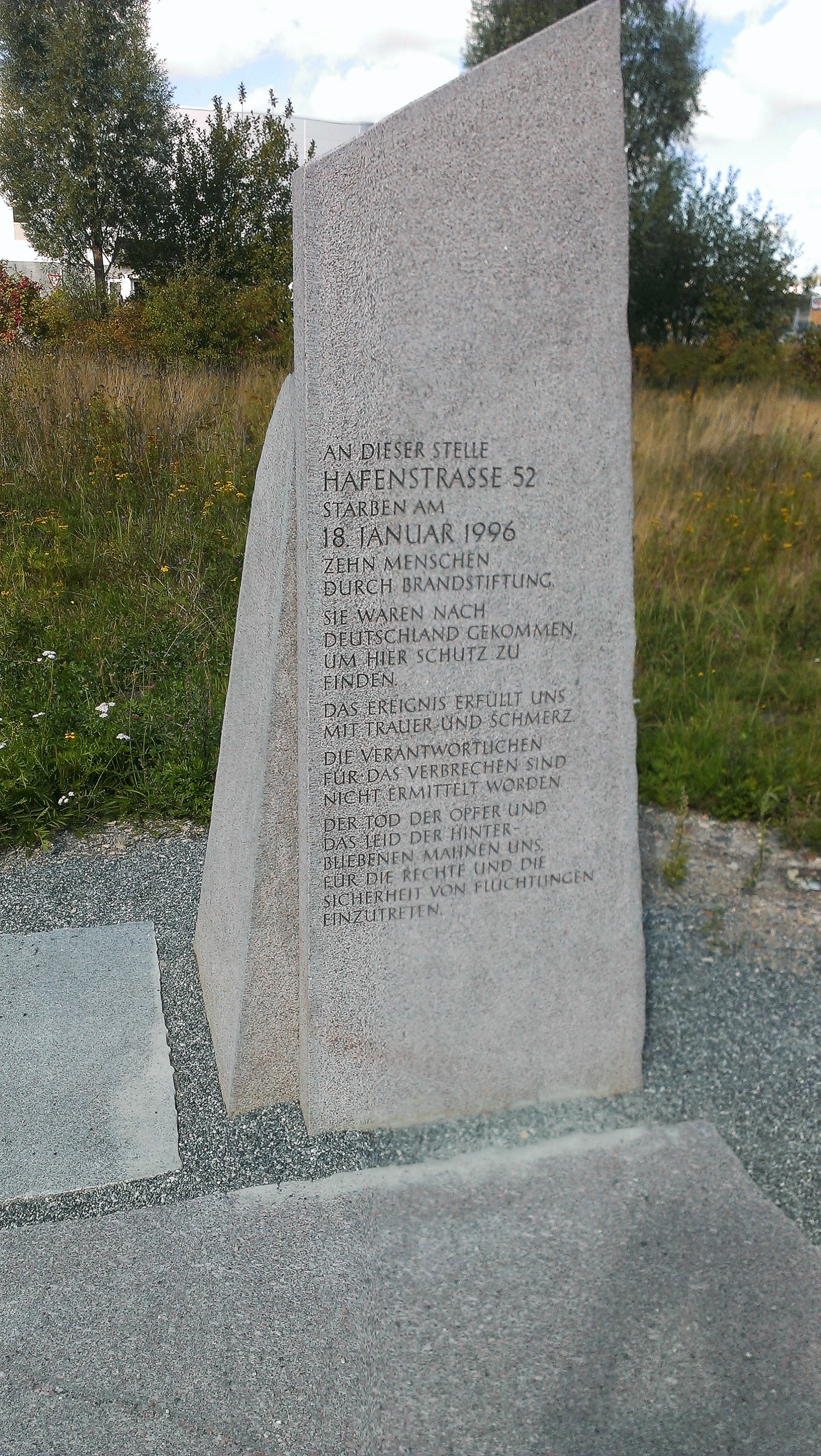 Gedenkstein für die Opfer des Lübecker Brandanschlags, Standort 2014